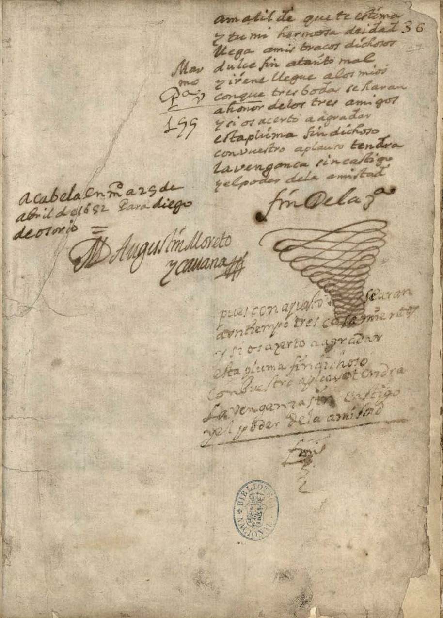 Colofón autógrafo de El poder de la amistad firmado y fechado por Agustín Moretoa 25 de abril de 1652 (fol. 36r). BNE Signatura Vitr/7/4